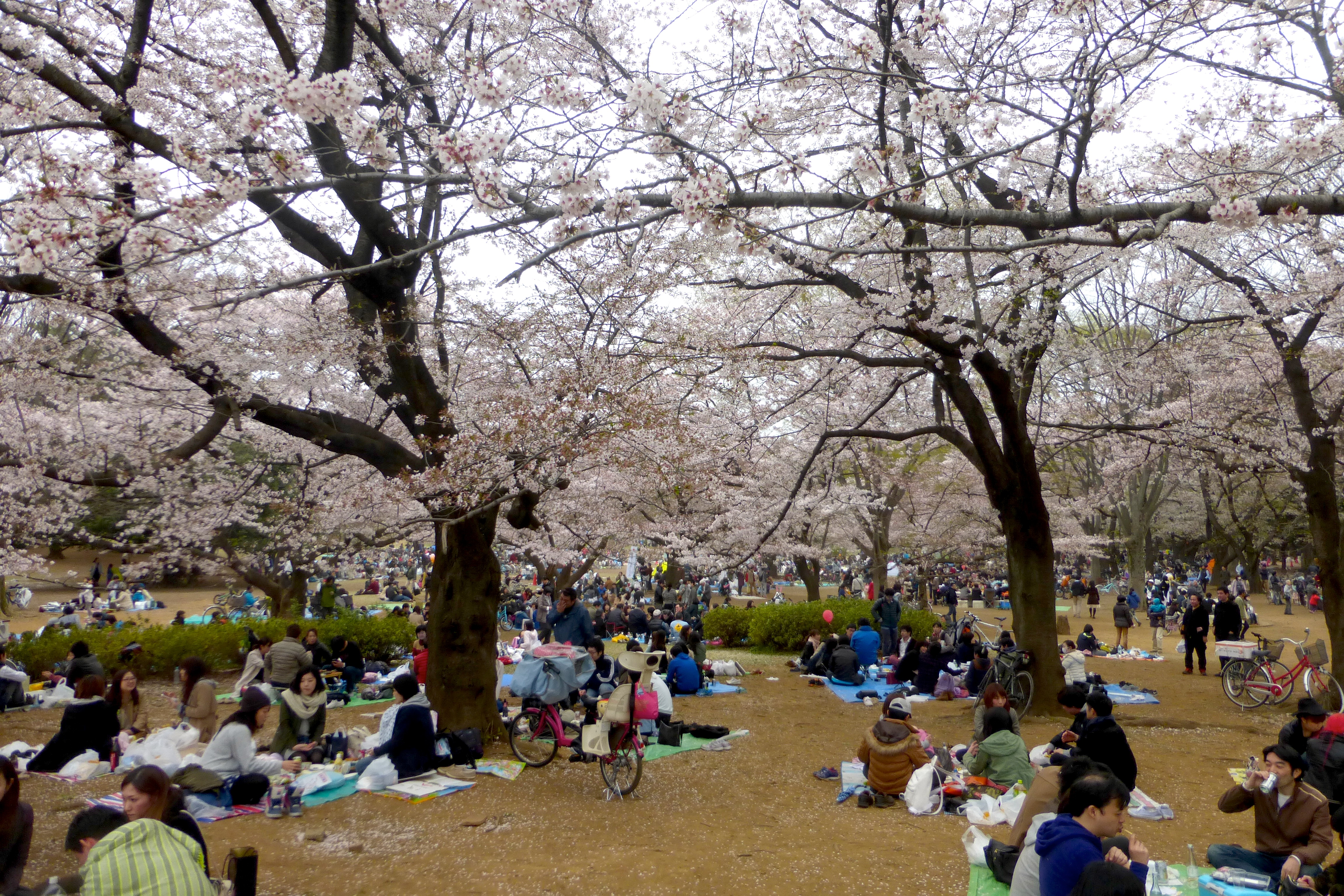 光が丘公園の花見 (cherry blossom viewing [hanami] in Hikarigaoka park)